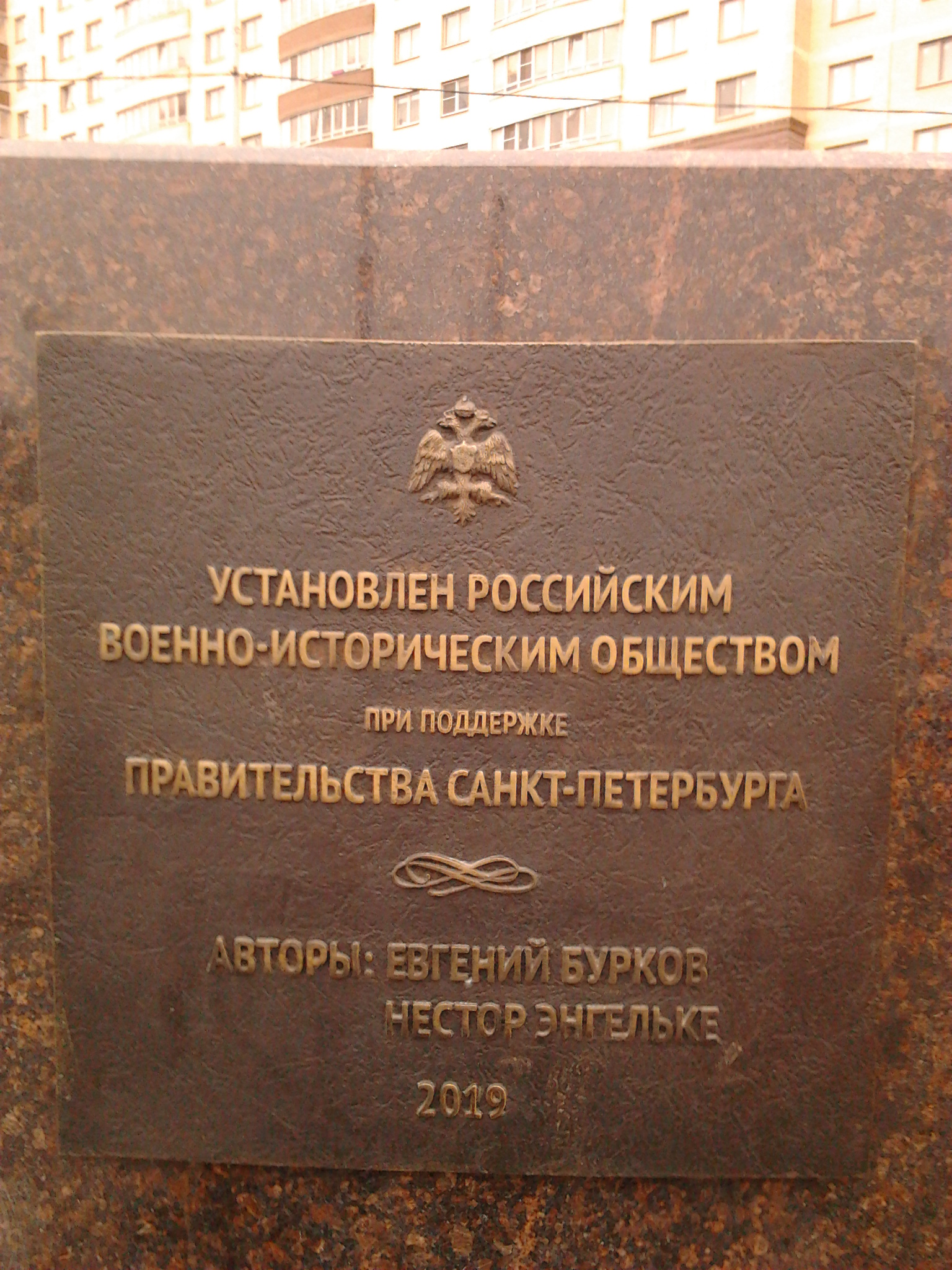 Памятная доска от создателей памятника.